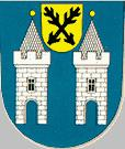 Znak města Zákupy získán ze stránky